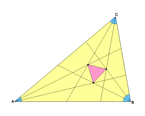 MorleyDreieck